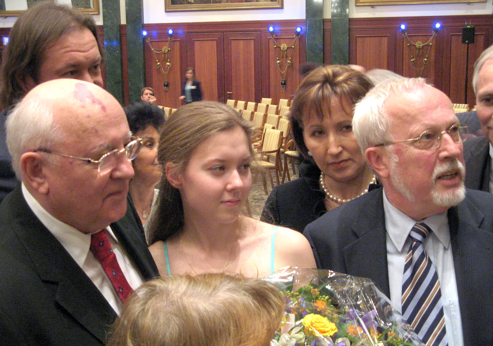 Michail Gorbatschow und Lothar de Maizière bei der Preisverleihung an Gorbatschow auf der Jahresversammlung des Deutsch-russischen Forums.